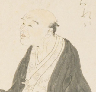 『肖像集』 戸田茂睡（1629-1706） 日本の江戸時代の歌学者・国学者